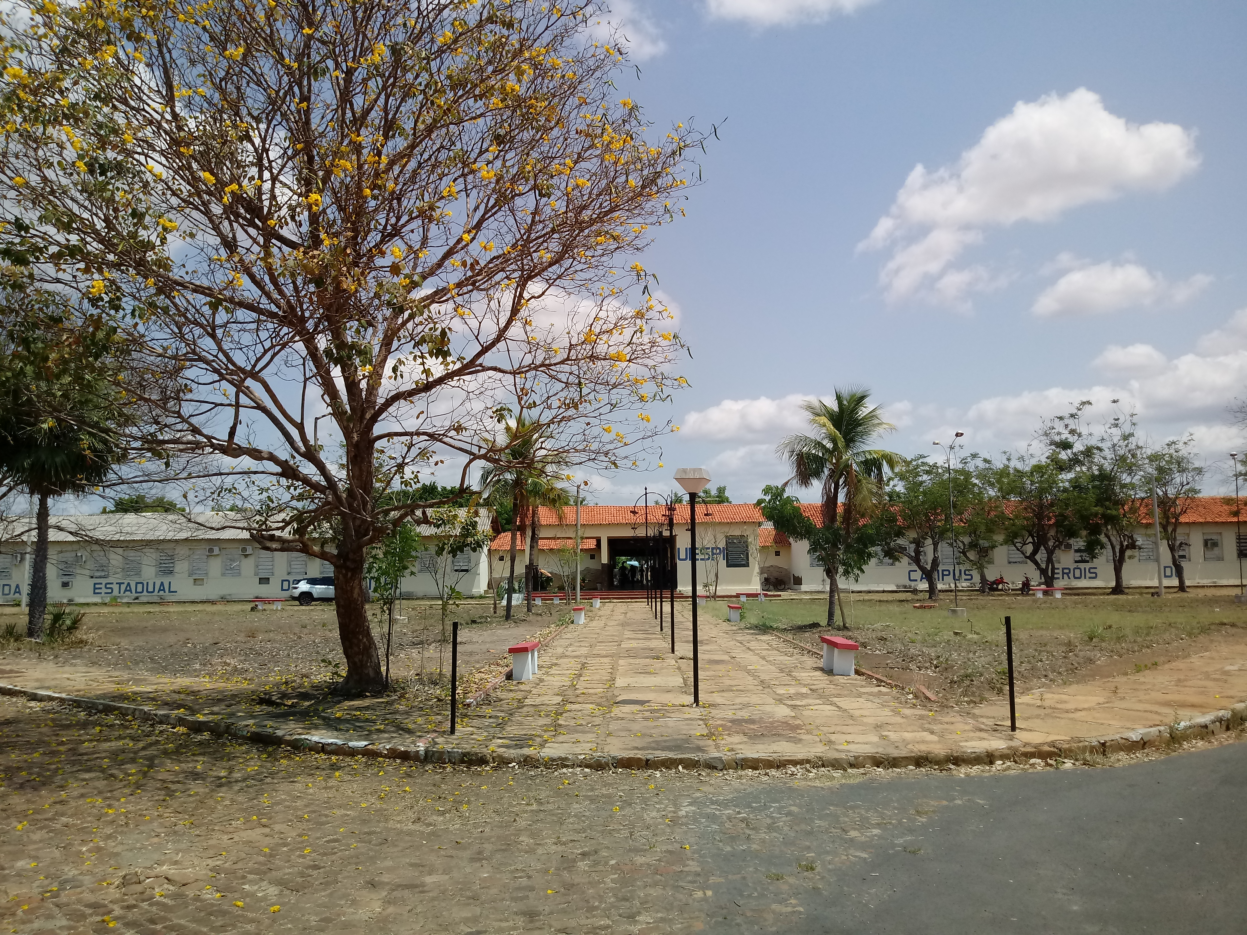 Vista do portal do campus de Campo Maior da Universidade Estadual do Piauí.